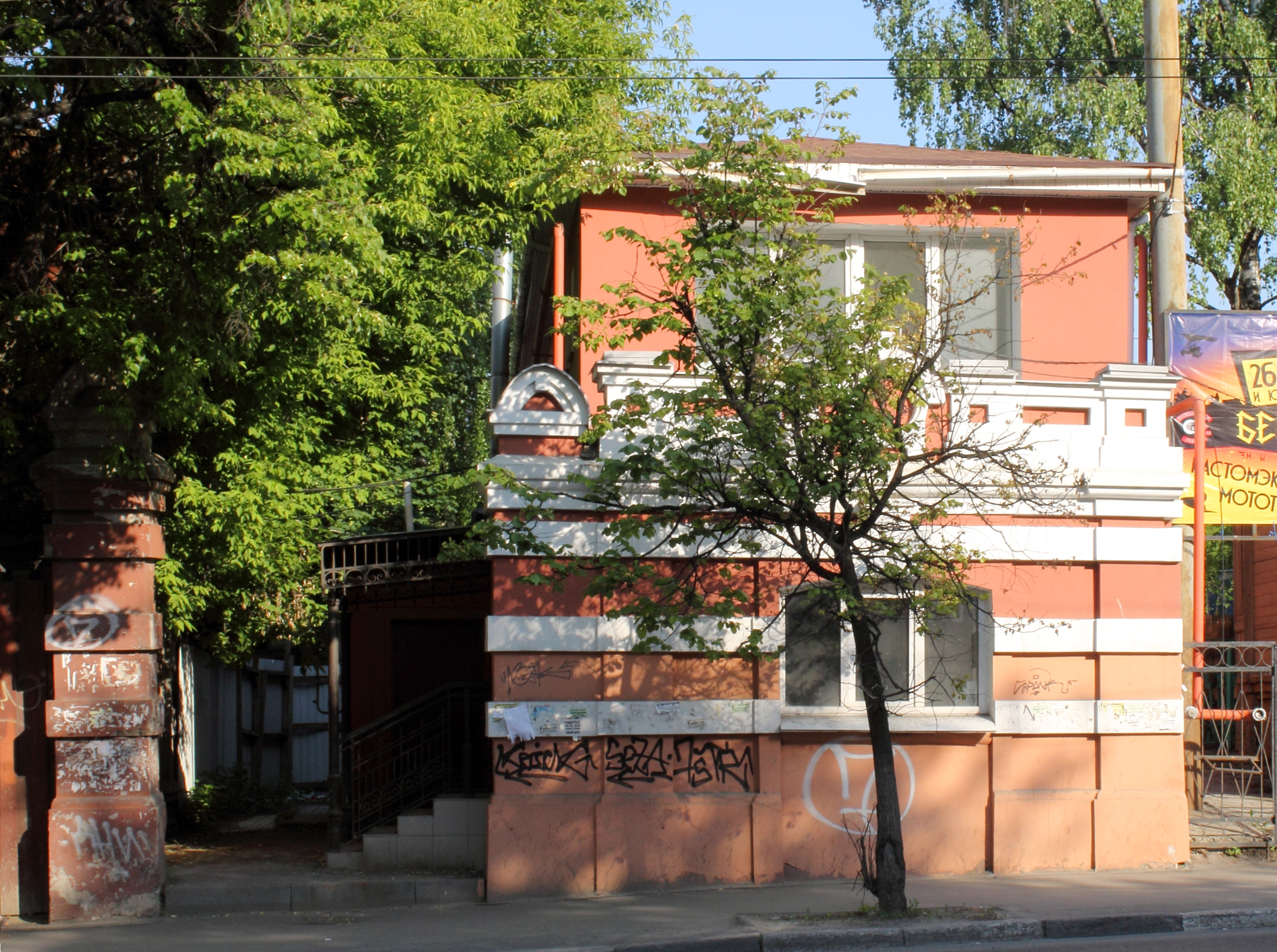 Торговая лавка: улица Большая Покровская, 68, 68-а, улица Воровского, 14, Нижний Новгород, Нижегородская область